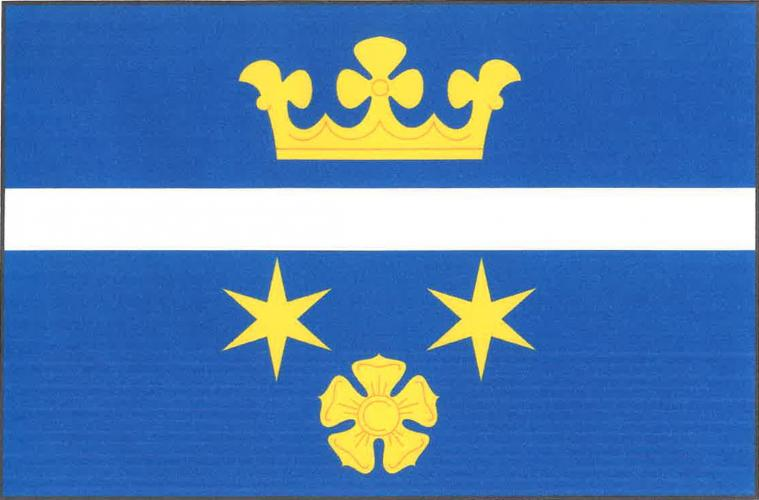 Rodvínov vlajka